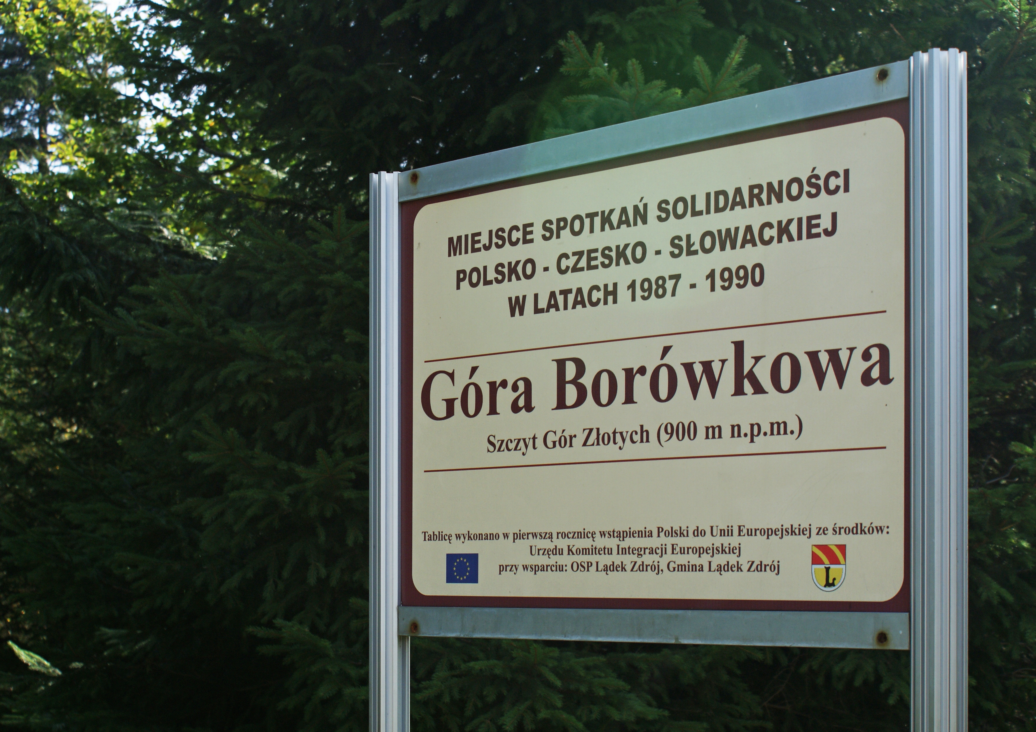 tablica na szczycie Borówkowej